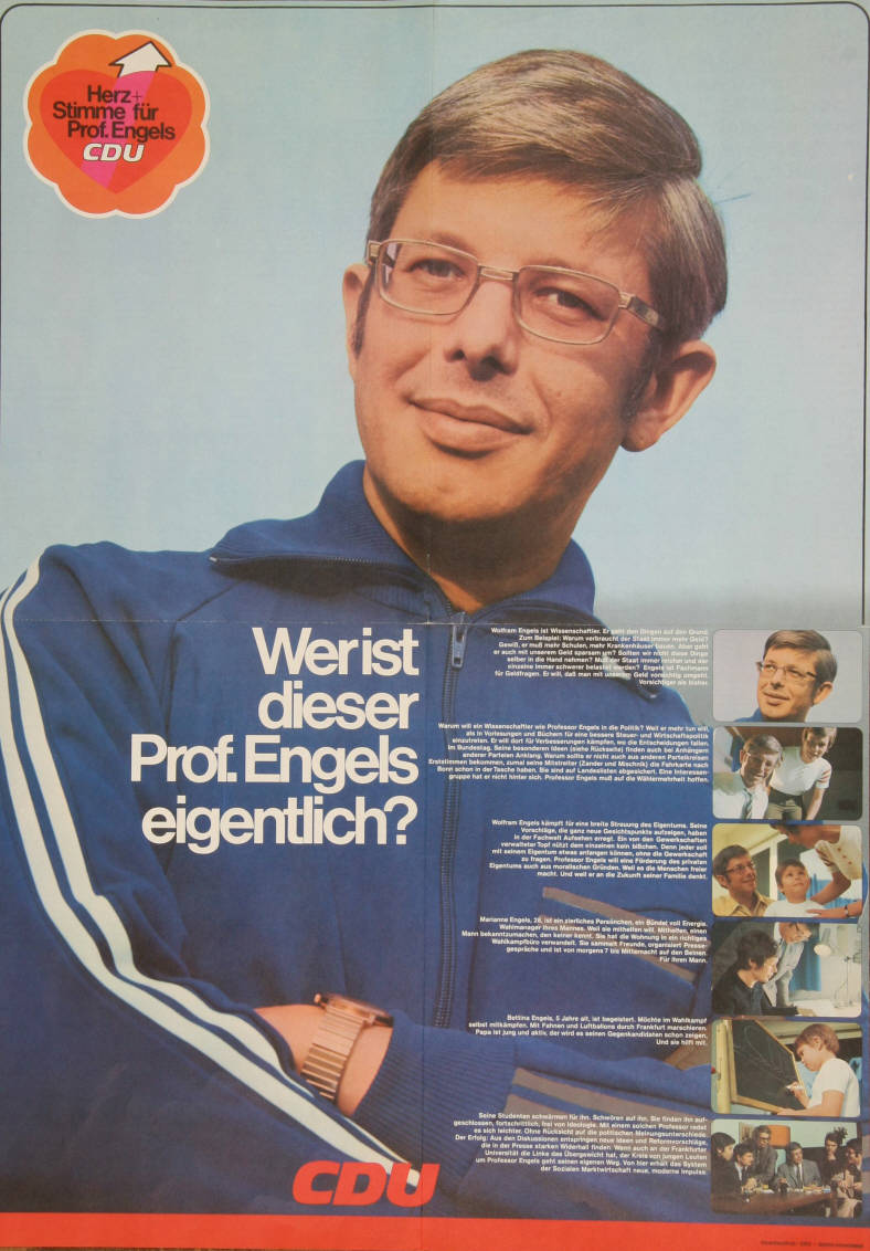 Herz + Stimme für Prof. Engels CDU Wer ist dieser Prof. Engels eigentlich? ... Abbildung: Porträtfoto, Fotocollage Kommentar: Beidseitig bedrucktes Plakat mit Lebenslauf, Vorstellung der Familie, Programmatik etc. Plakatart: Kandidaten-/Personenplakat mit Porträt Auftraggeber: CDU-Stadtkreisverband Frankfurt/M Objekt-Signatur: 10-001: 1758 Bestand: Plakate zu Bundestagswahlen (10-001) GliederungBestand10-18: Plakate zu Bundestagswahlen (10-001) » Die 7. Bundestagswahl am 19. November 1972 » CDU » Mit Porträtfoto Lizenz: KAS/ACDP 10-001: 1758 CC-BY-SA 3.0 DE